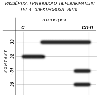 Развёртка группового переключателя ПкГ-4 электровоза ВЛ10